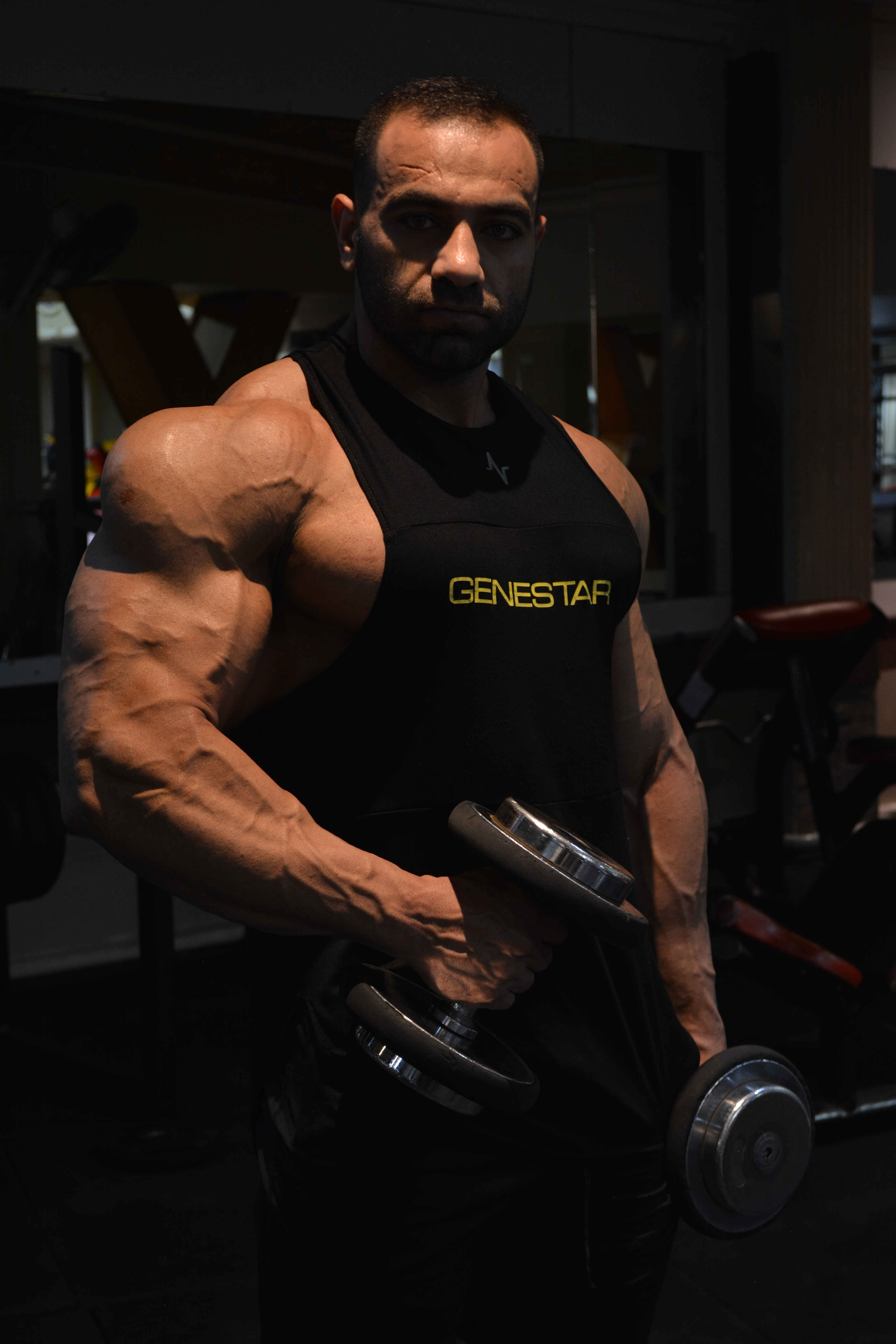 علی اجلالی در حال تمرین در تهران